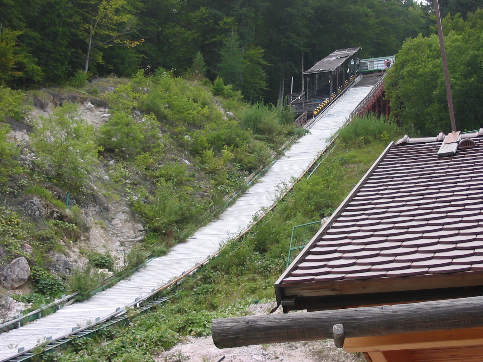 inrun of Letalnica, Planica, Slovenia